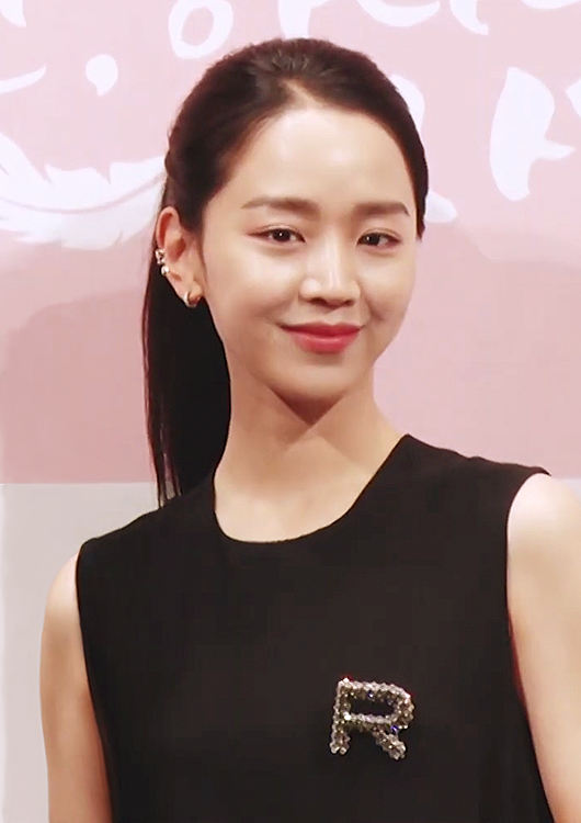 KBS-2TV 수목드라마 ‘단 하나의 사랑’ 제작발표회가 21일 오후 서울 강남구 논현동 임피리얼 팰리스 호텔에서 열렸다